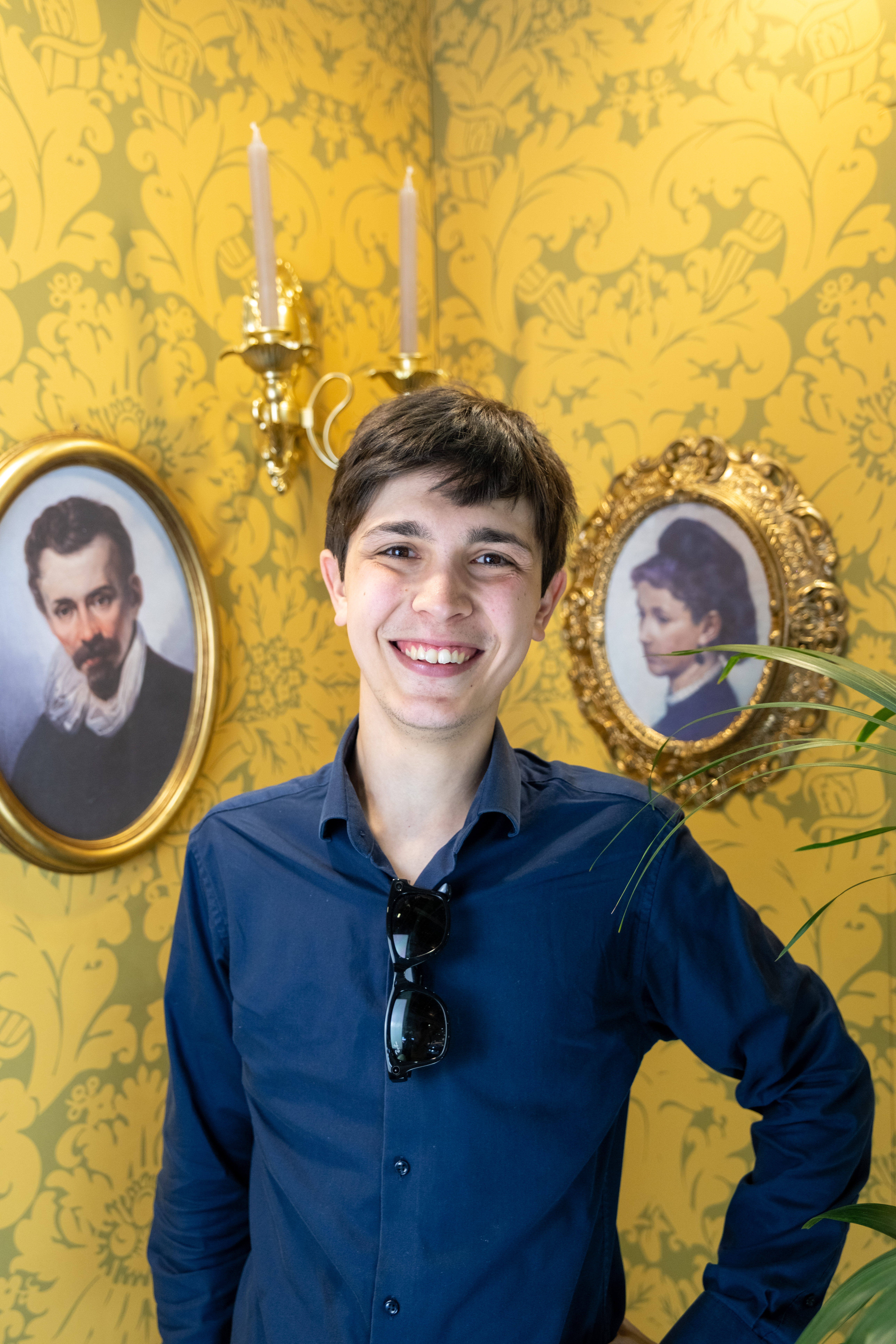 L'immagine ritrae lo scrittore Matteo Porru.